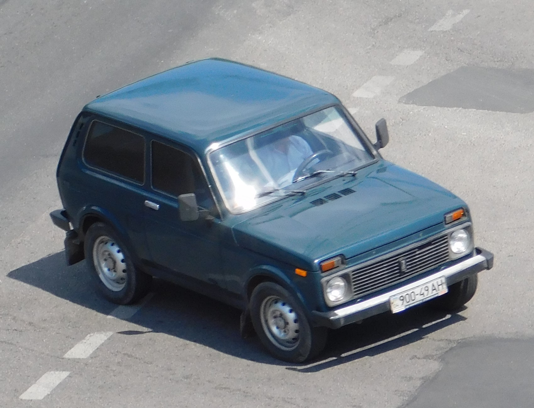 ВАЗ-2121 - 900-49 АН, перед